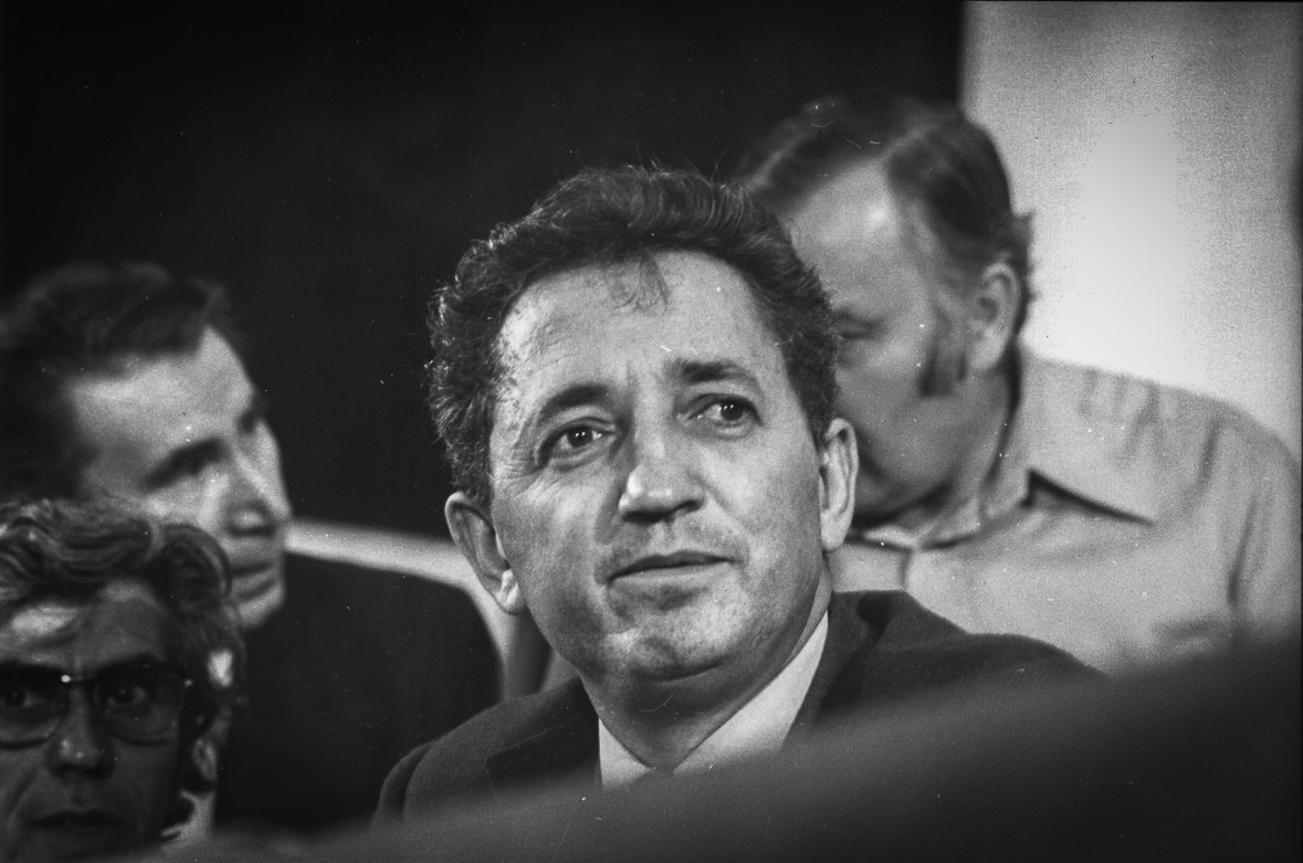 Edmond Maire (né le 24 janvier 1931 à Épinay-sur-Seine) est un syndicaliste français, ancien secrétaire général de la Confédération française démocratique du travail.